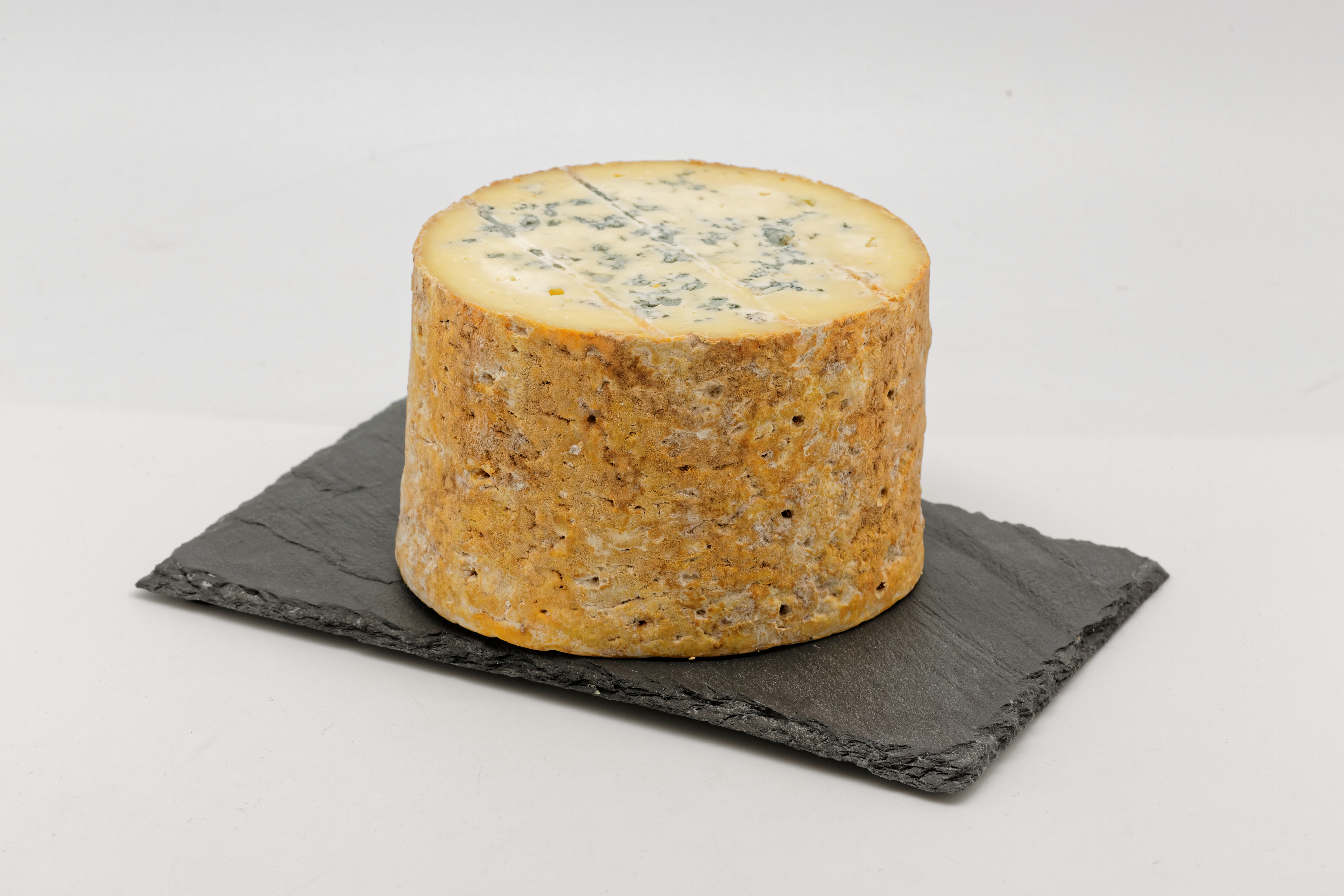 La fourme de Montbrison est un fromage de lait de vache, à pâte persillée.